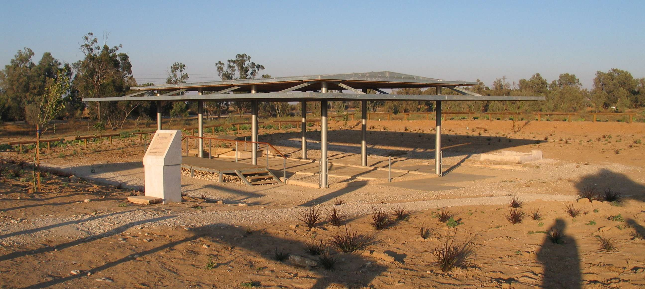 Maon synagogue, near kibutz Nirim, Israel.